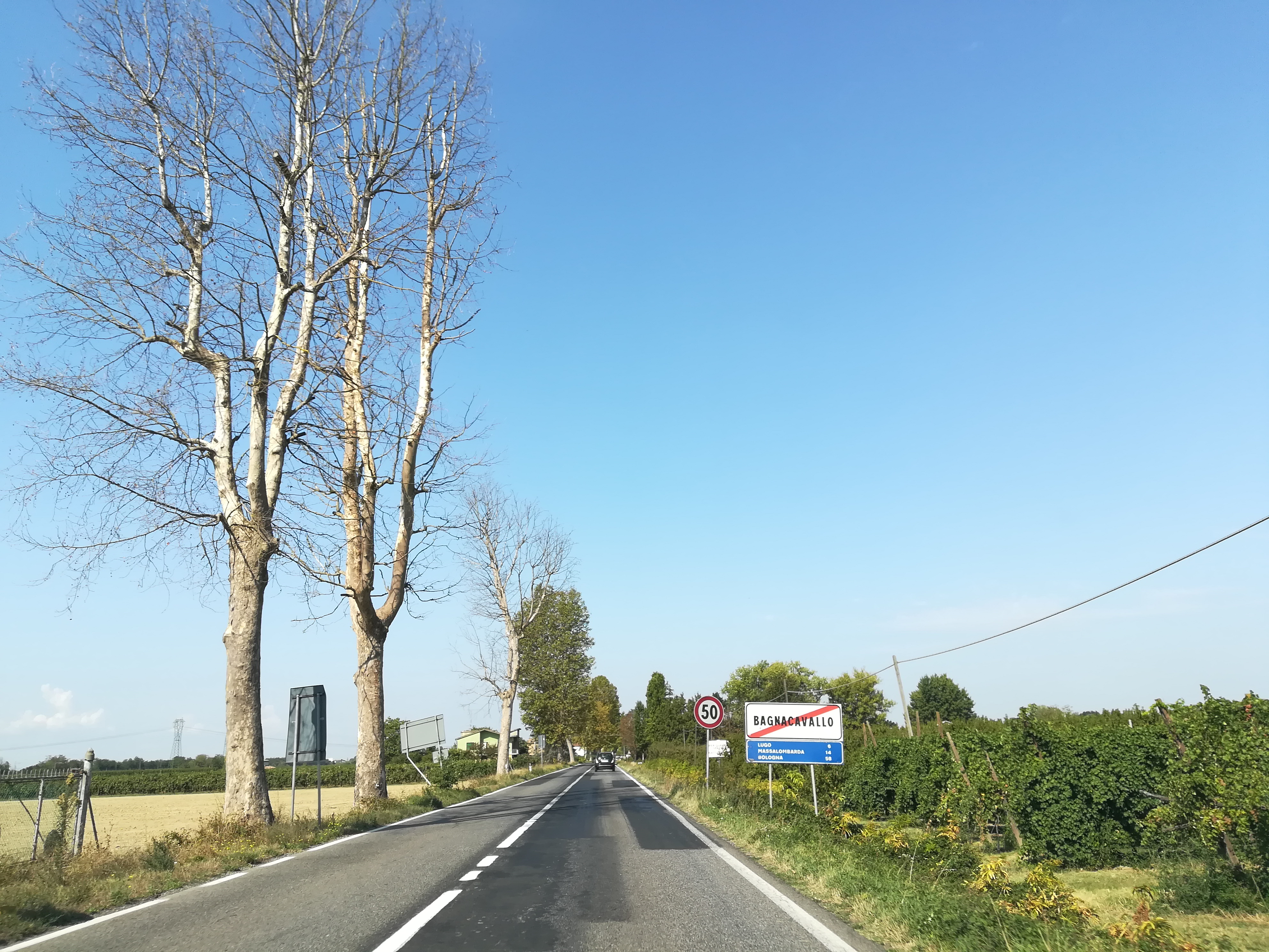 Bagnacavallo